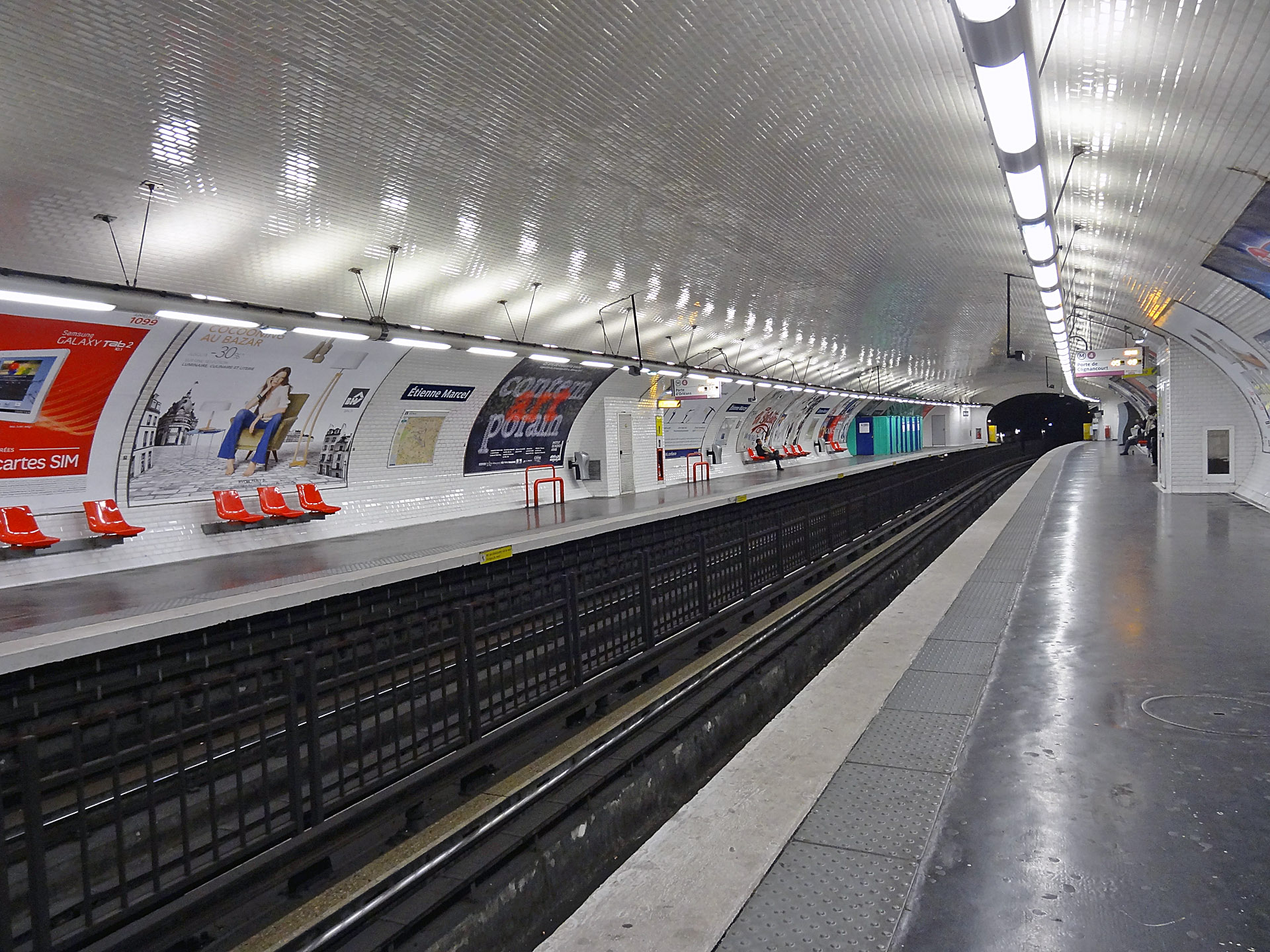 Station Étienne Marcel de la ligne 4 du métro de Paris, France.